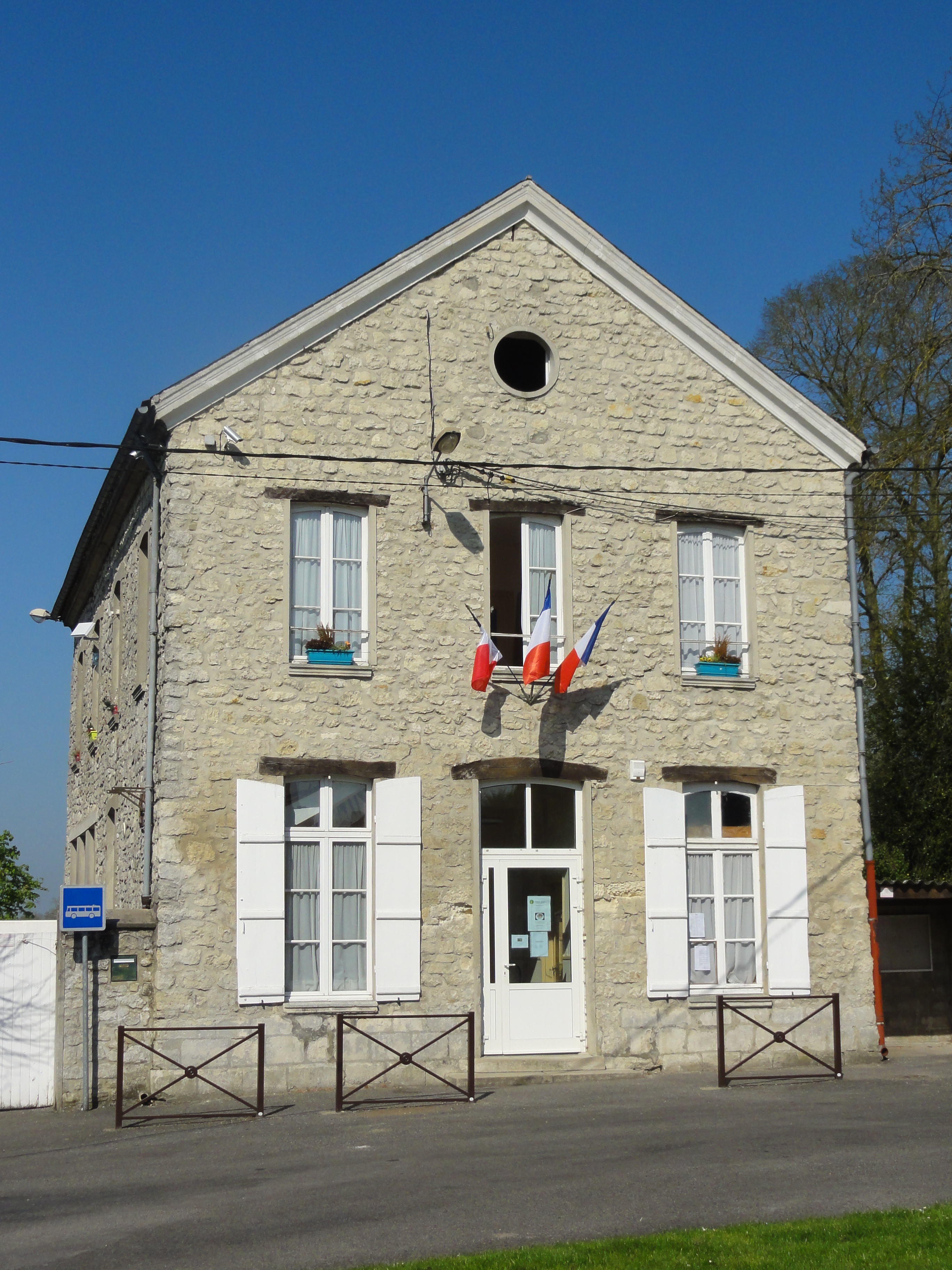 La mairie-école, rue du Château, en face de l'église.